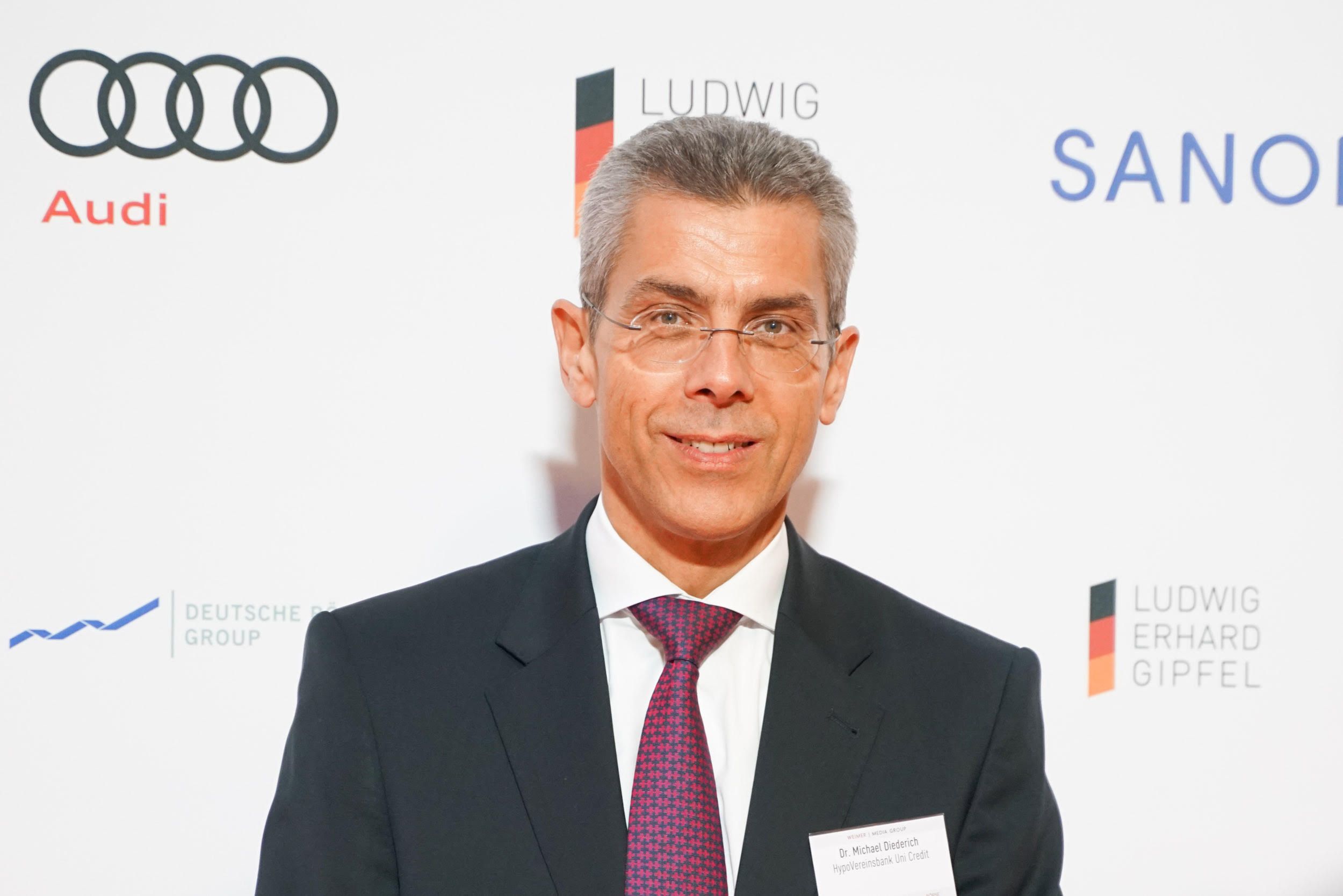 Michael Diederich